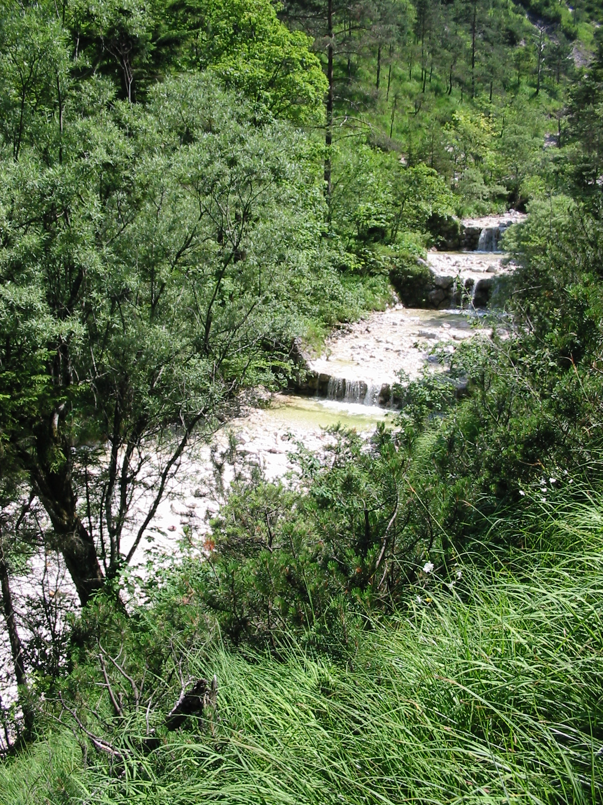 Der Weißbach, fotografiert vom Fuß der Hochplatte gesehen (auf der linken Seite des Bachbettes befindet sich der Lattenberg, dieser ist im Bild jedoch nicht zu sehen).